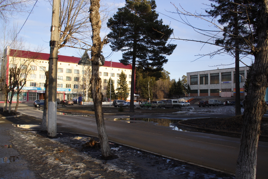 Вид на спортивный комплекс "Заря" и гостиницу "Восток" (Бийск)